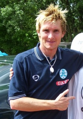 Ferhat Cerci 2008